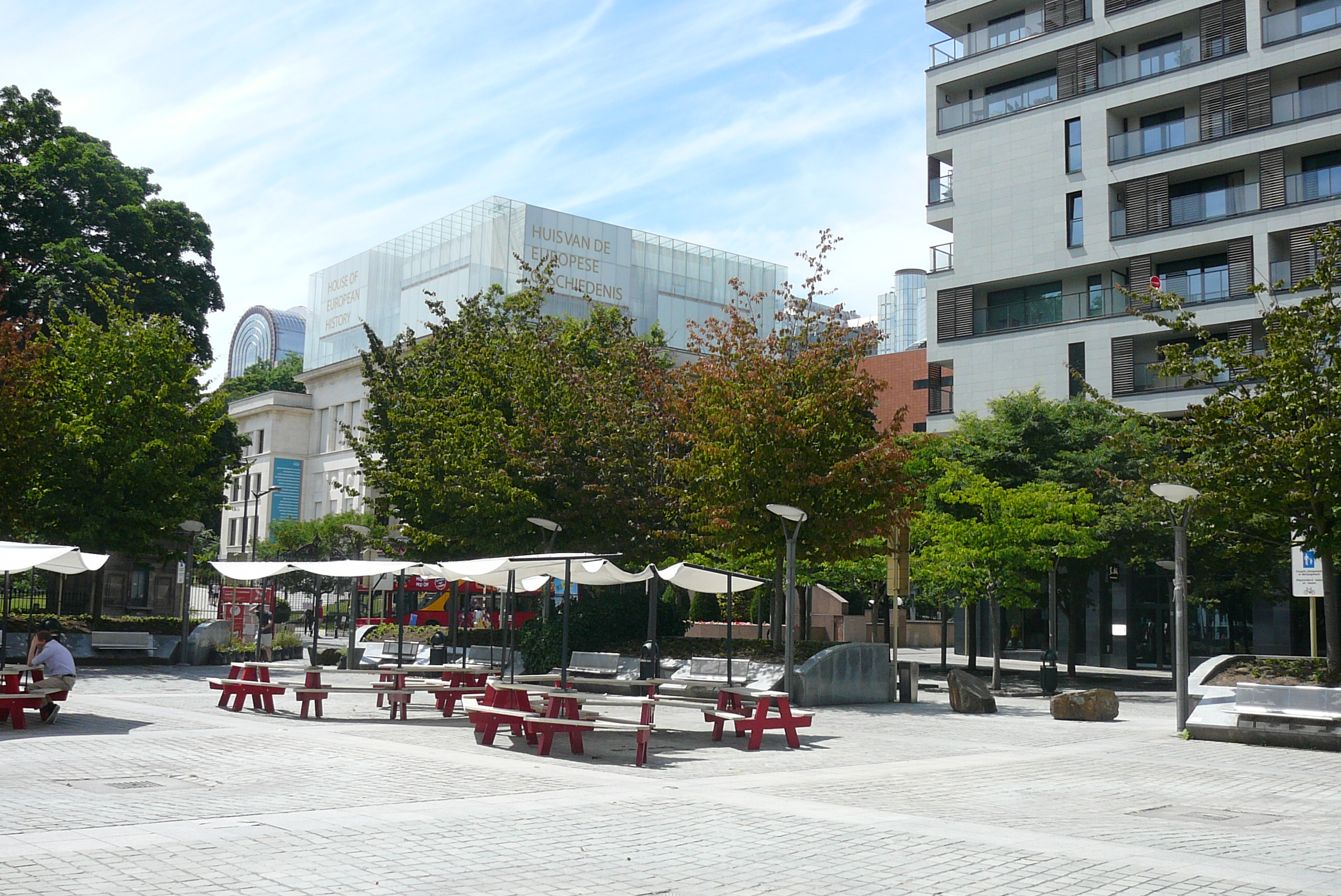 Place Jean Rey, à Etterbeek, Région bruxelloise, Belgique